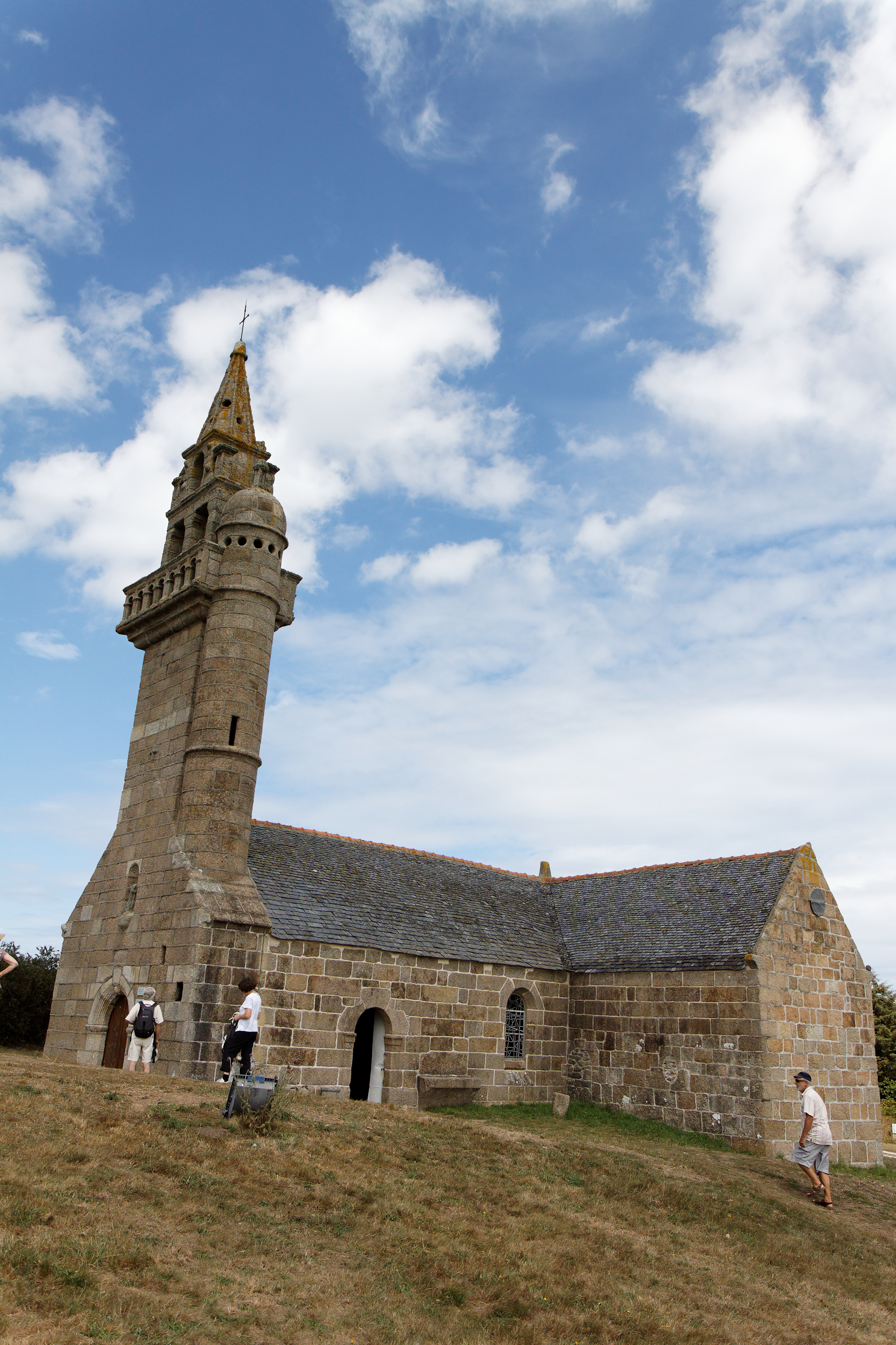 Vue de la chapelle. .